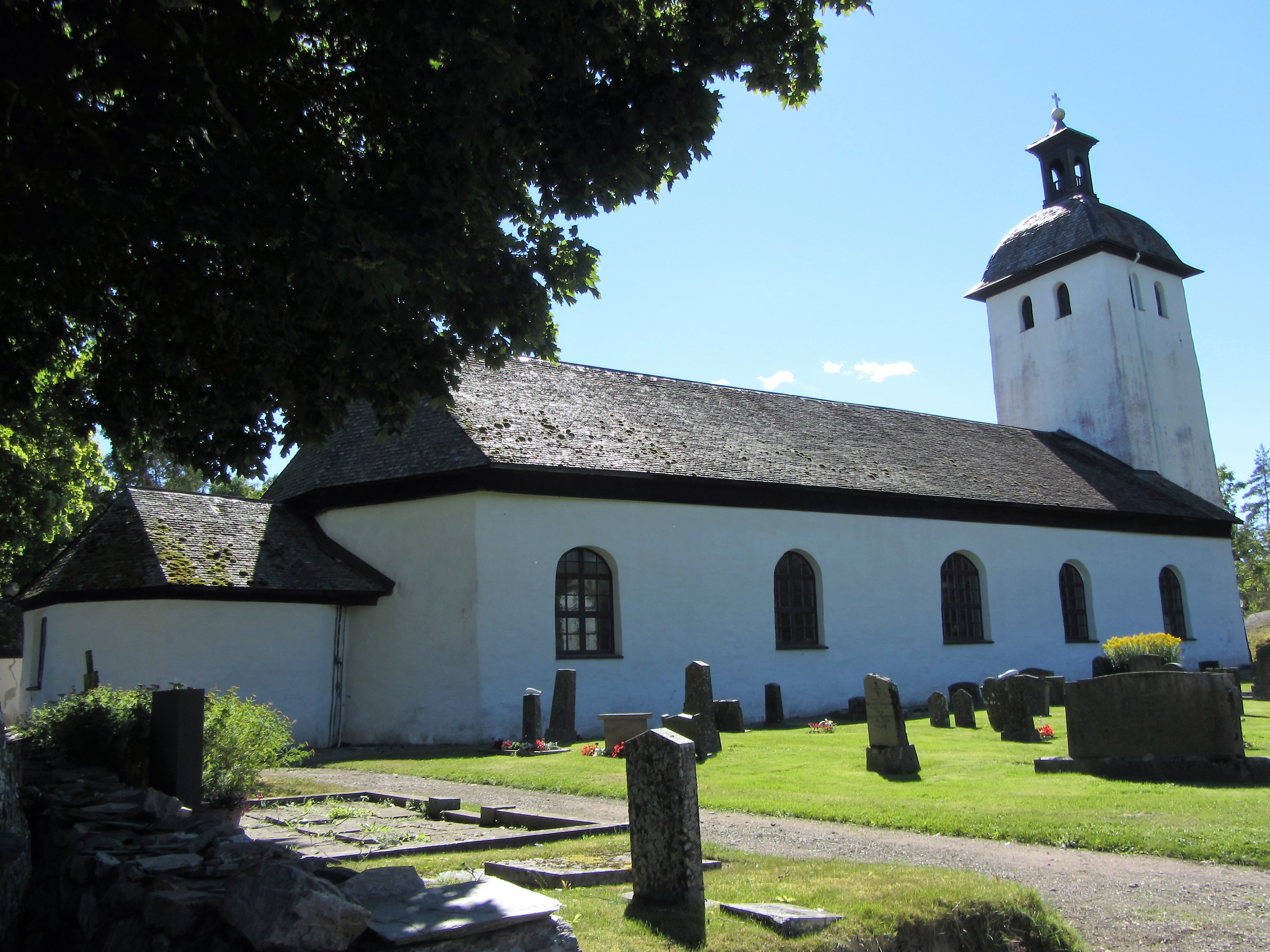 Steneby kyrka, söder om Bengtsfors i Dalsland.